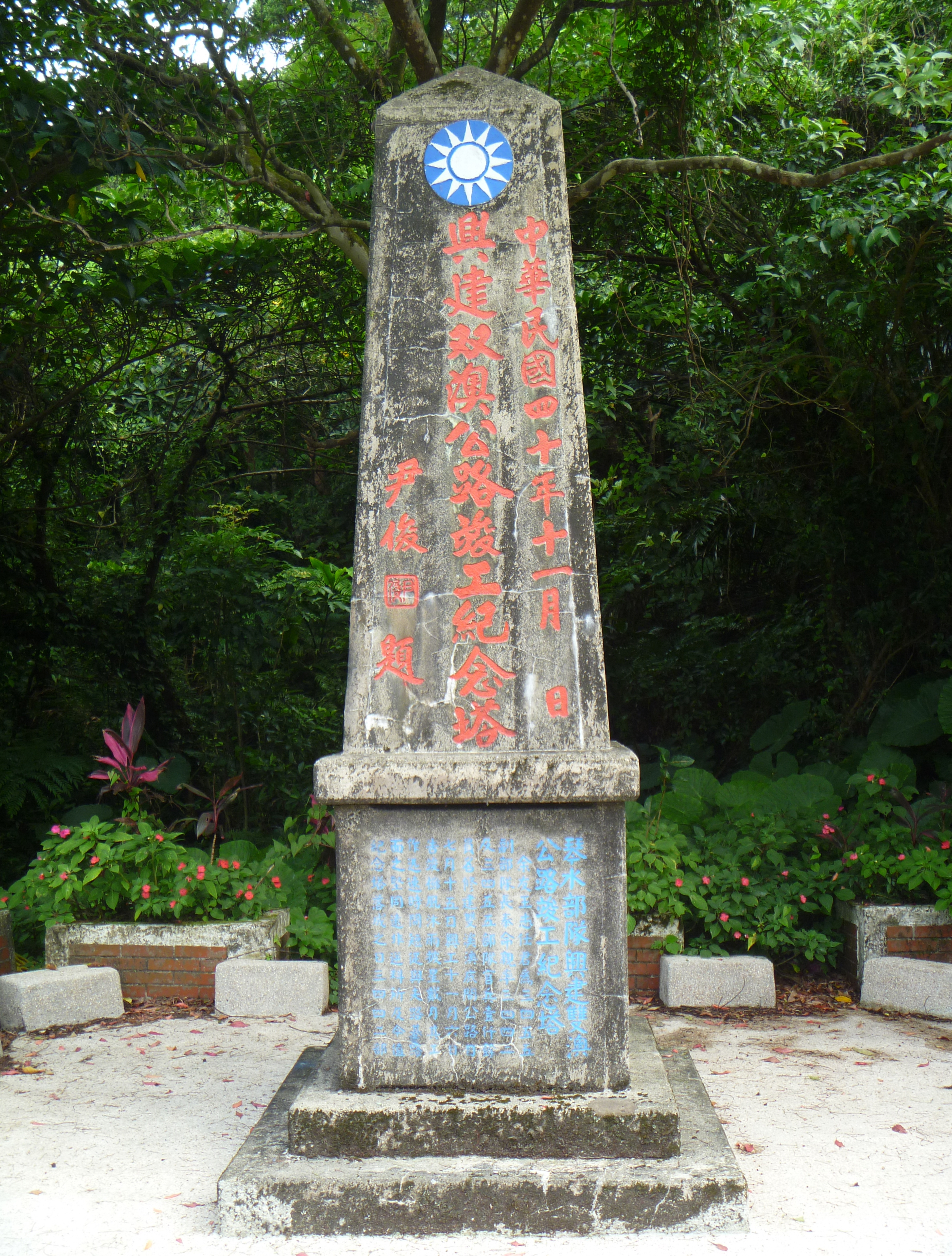 中華民國四十年十一月，國民革命軍第十八軍琴水部隊竣工興建雙澳公路，立紀念塔於嶺頭觀日步道口留念，尹俊題字。位置：台二甲線，座標25.05591,121.889266。